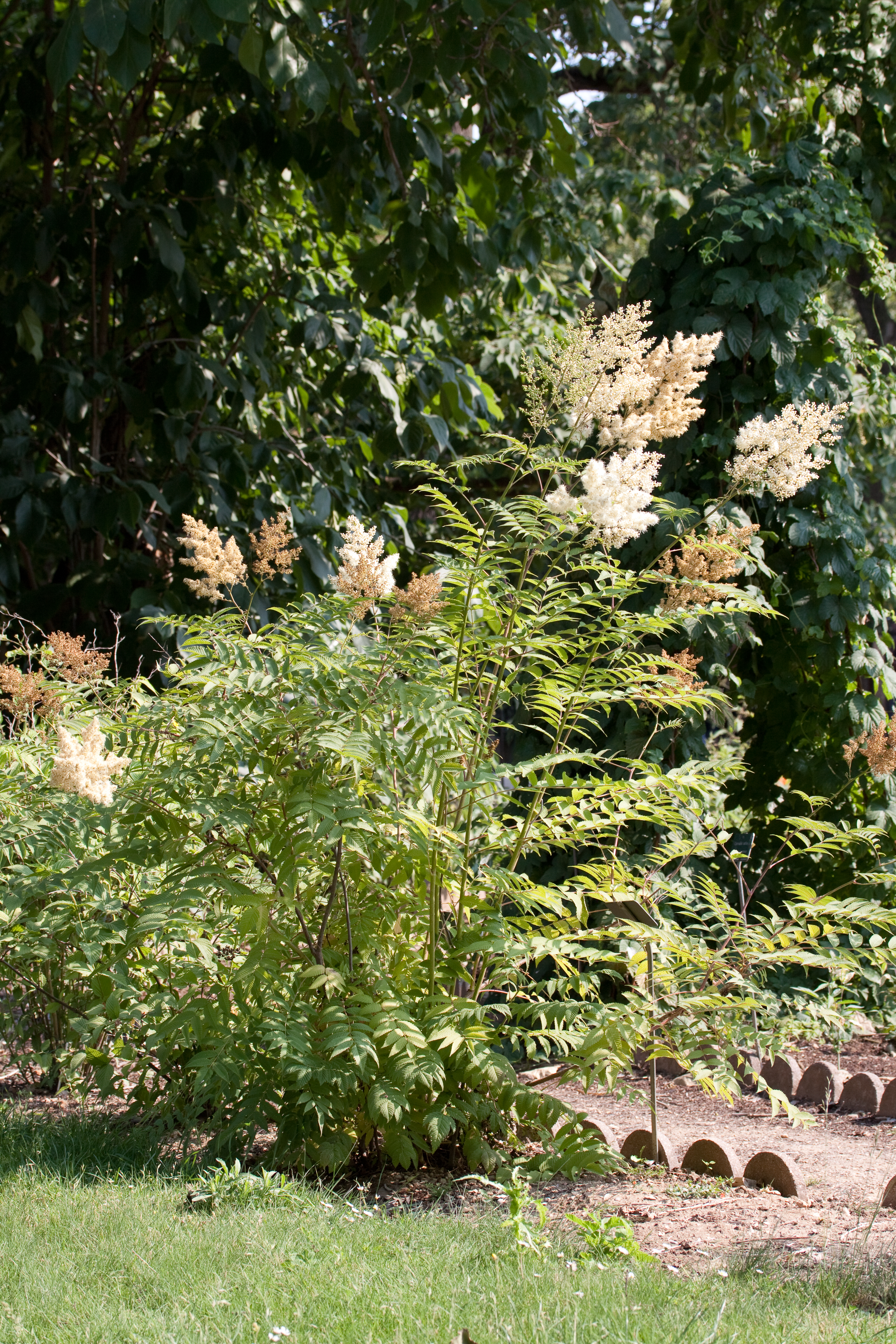 Vue générale de Sorbaria grandiflora - Jardin des Plantes - Paris